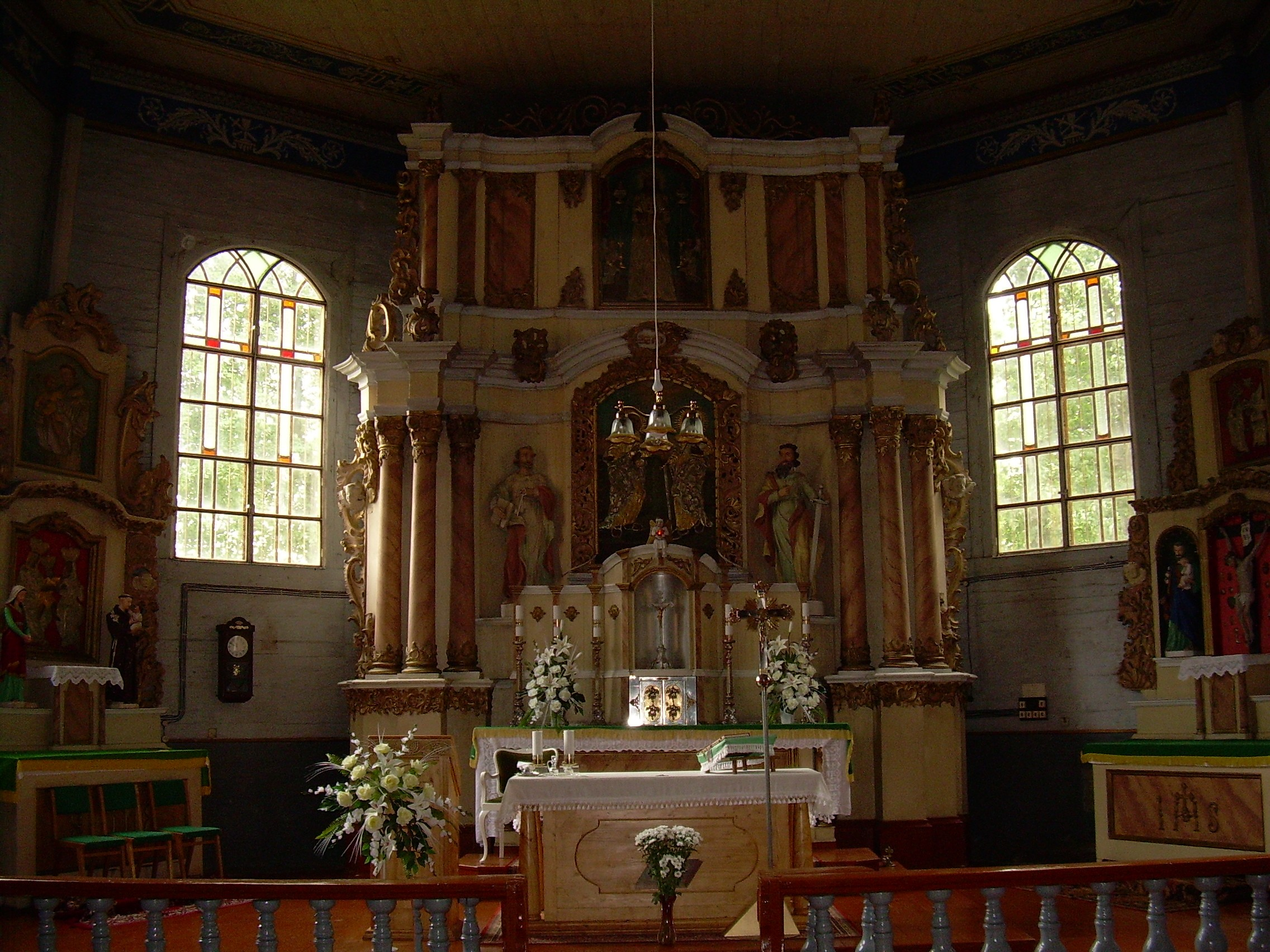 Platelių Šv. apaštalų Petro ir Pauliaus bažnyčia